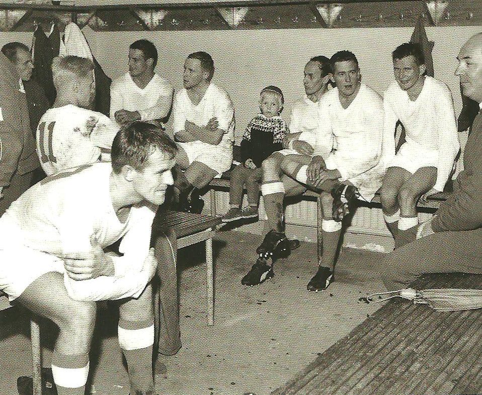 Upon Pallon joukkue tauolla kaudella 1964